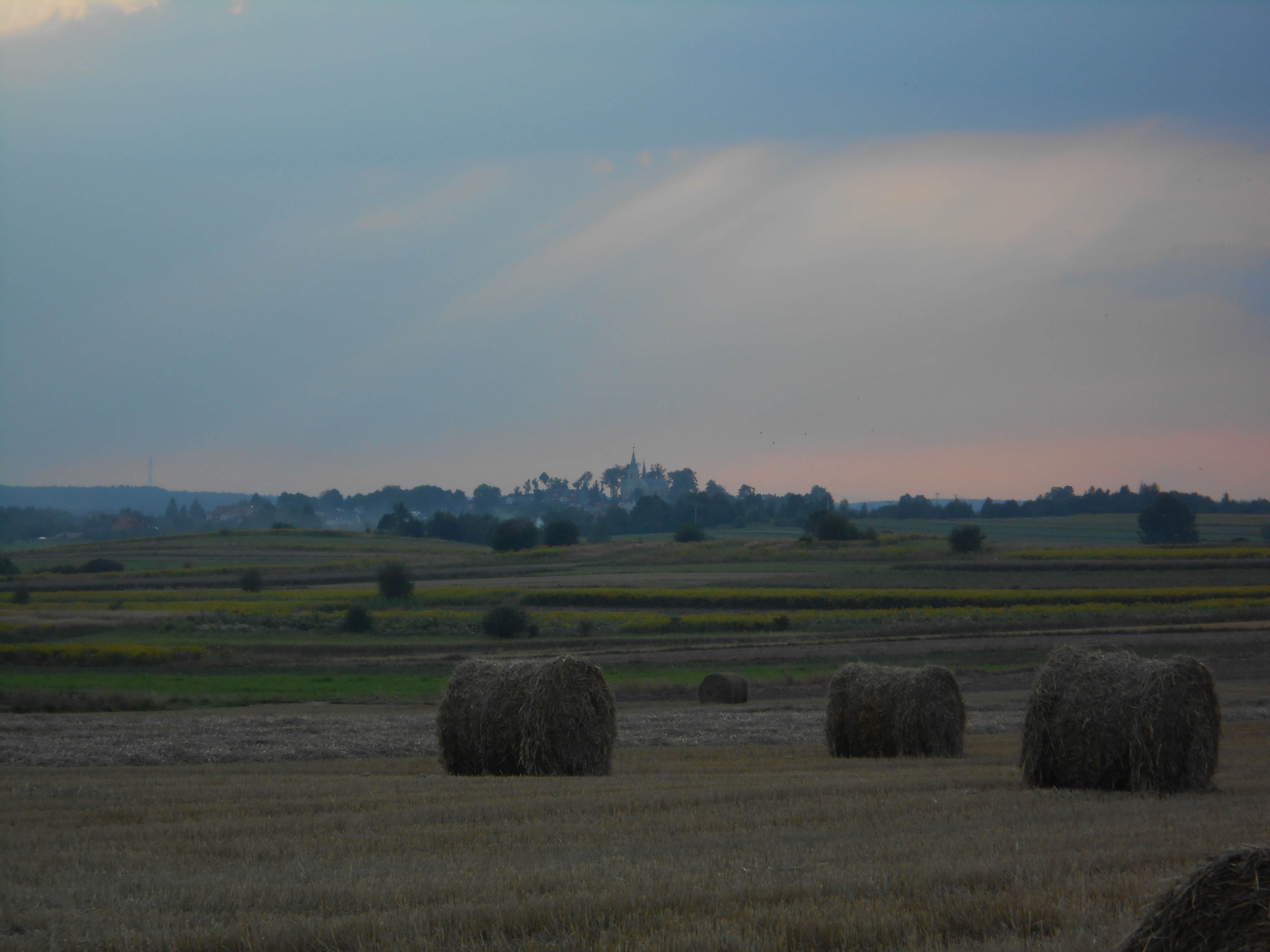 Przeginia widziana z pól